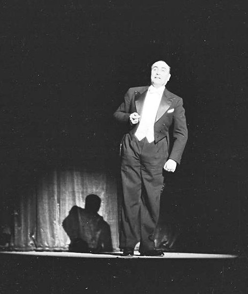 Wintergarten (Varieté); Karl Peukert